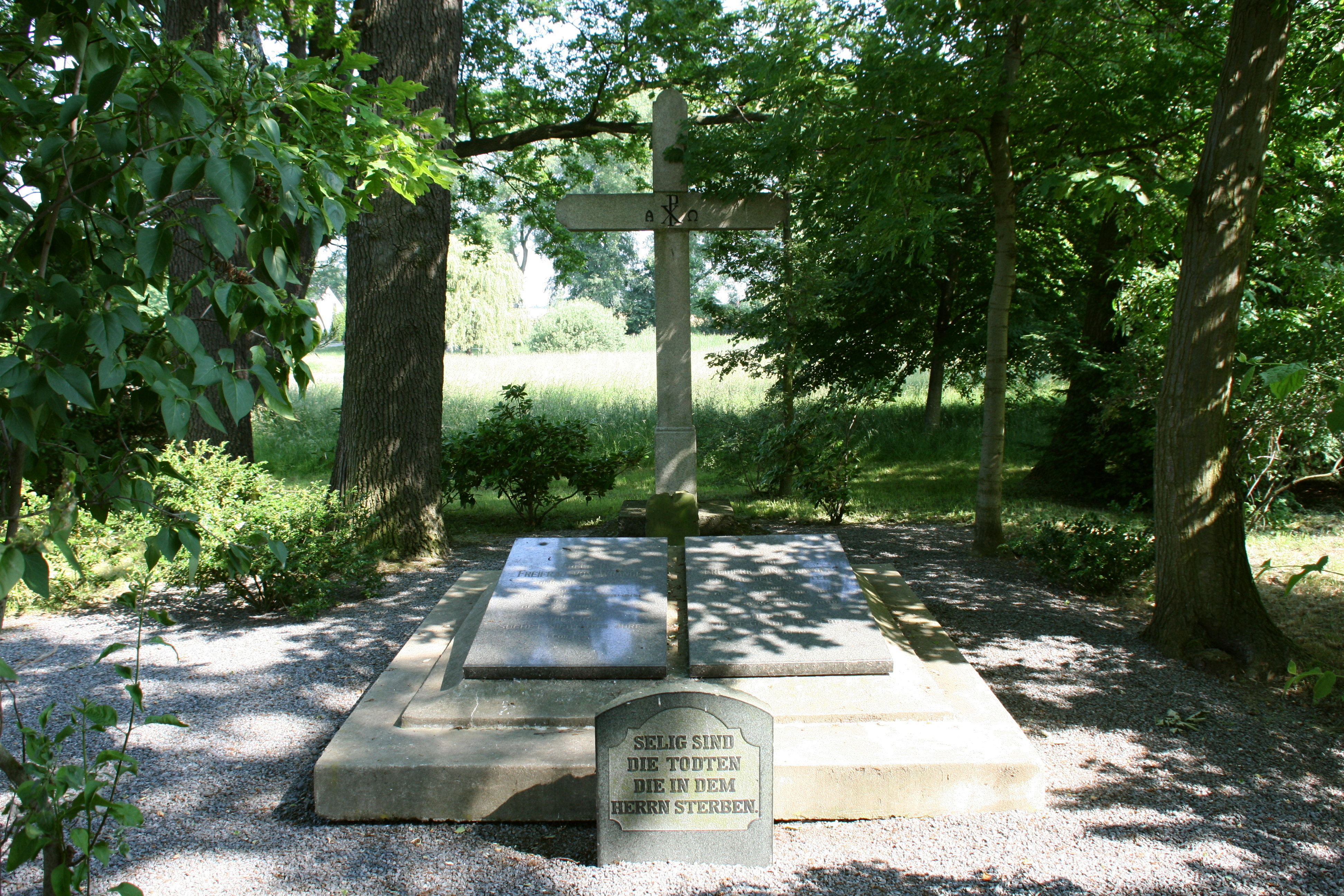 Soldatenfriedhof an der Seer Straße in Sproitz, Quitzdorf am See; Grabstätte mit Grabplatten von Karl von Wrangel und seiner Frau